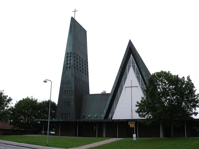 Kolding Brændkjærkirken i Danmark. Brændkjærkirken